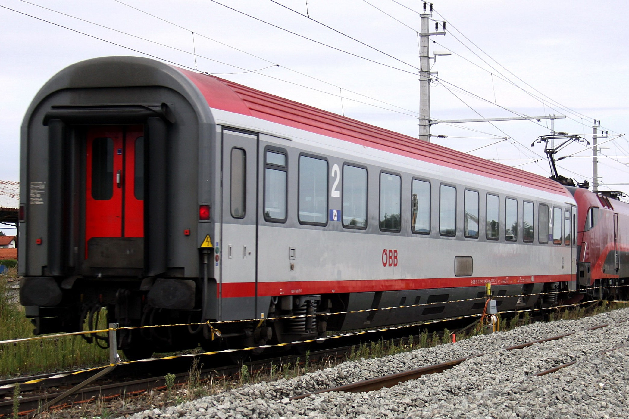 ÖBB-Abteilwagen Bmz 73 81 21-91 1??-5